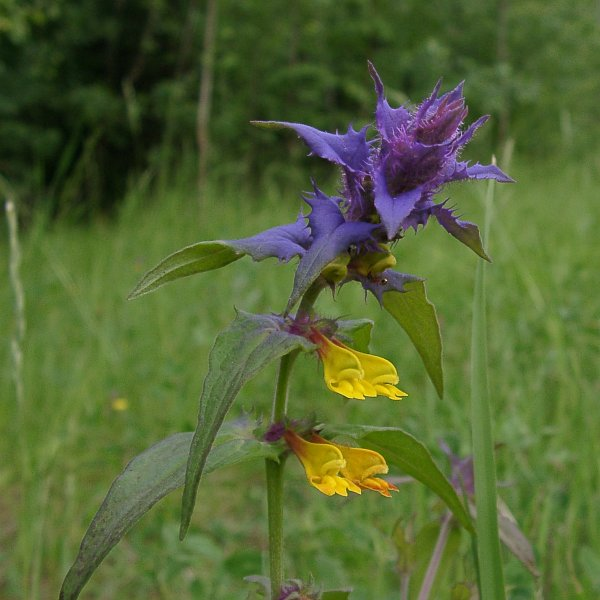 Foto på blomma Natt och dag (Melampyrum nemorosum); Hagahögen i Hagaparken, Stockholm.